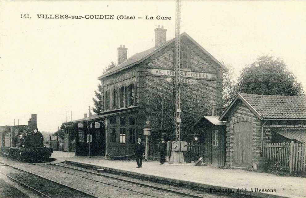 Train arrivant en gare de Villers-sur-Coudun, l'une des quatre gares intermédiaires de la ligne de Compiègne à Roye.